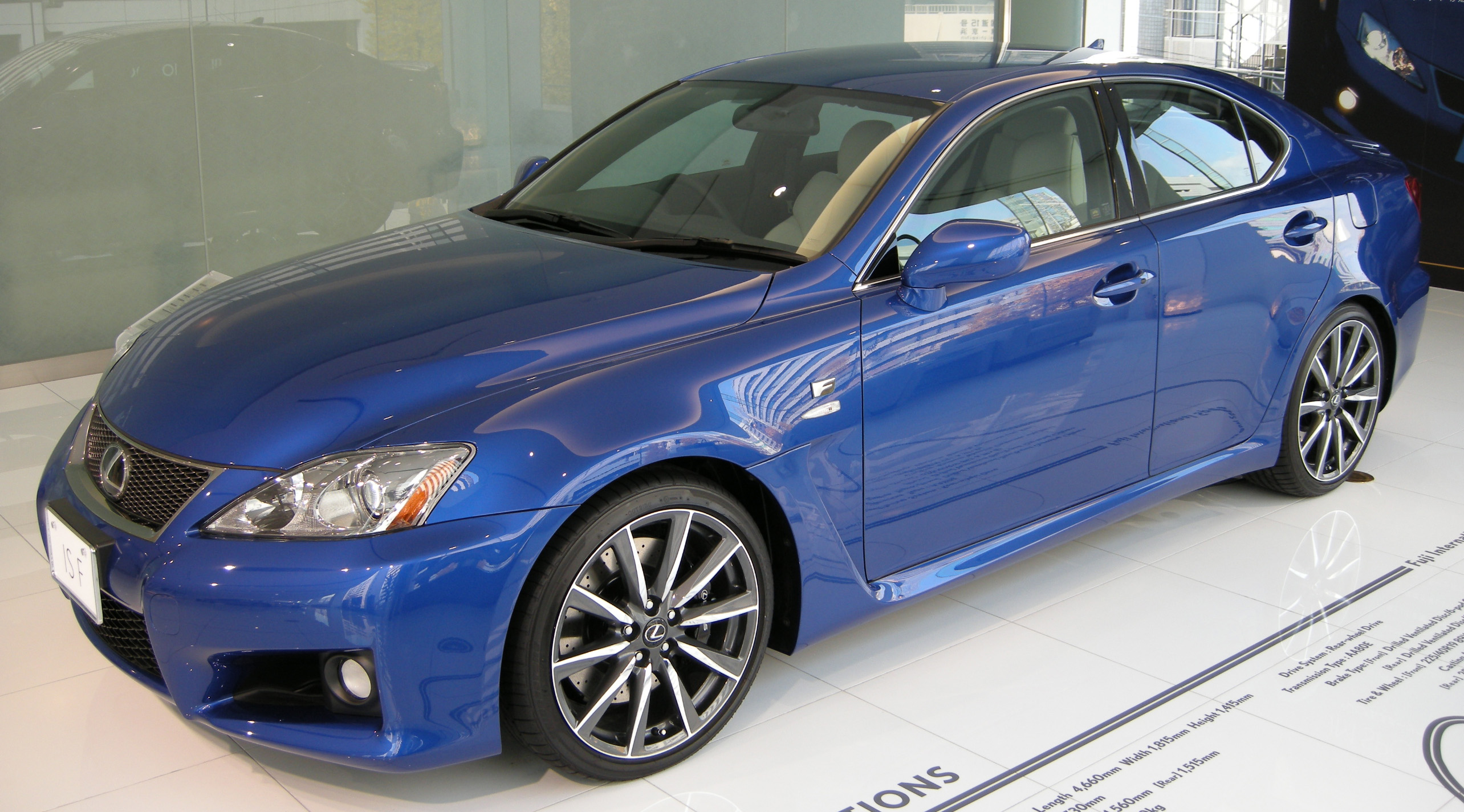 Lexus IS F in Lexus Gallery Takanawa (Minato, Tokyo)